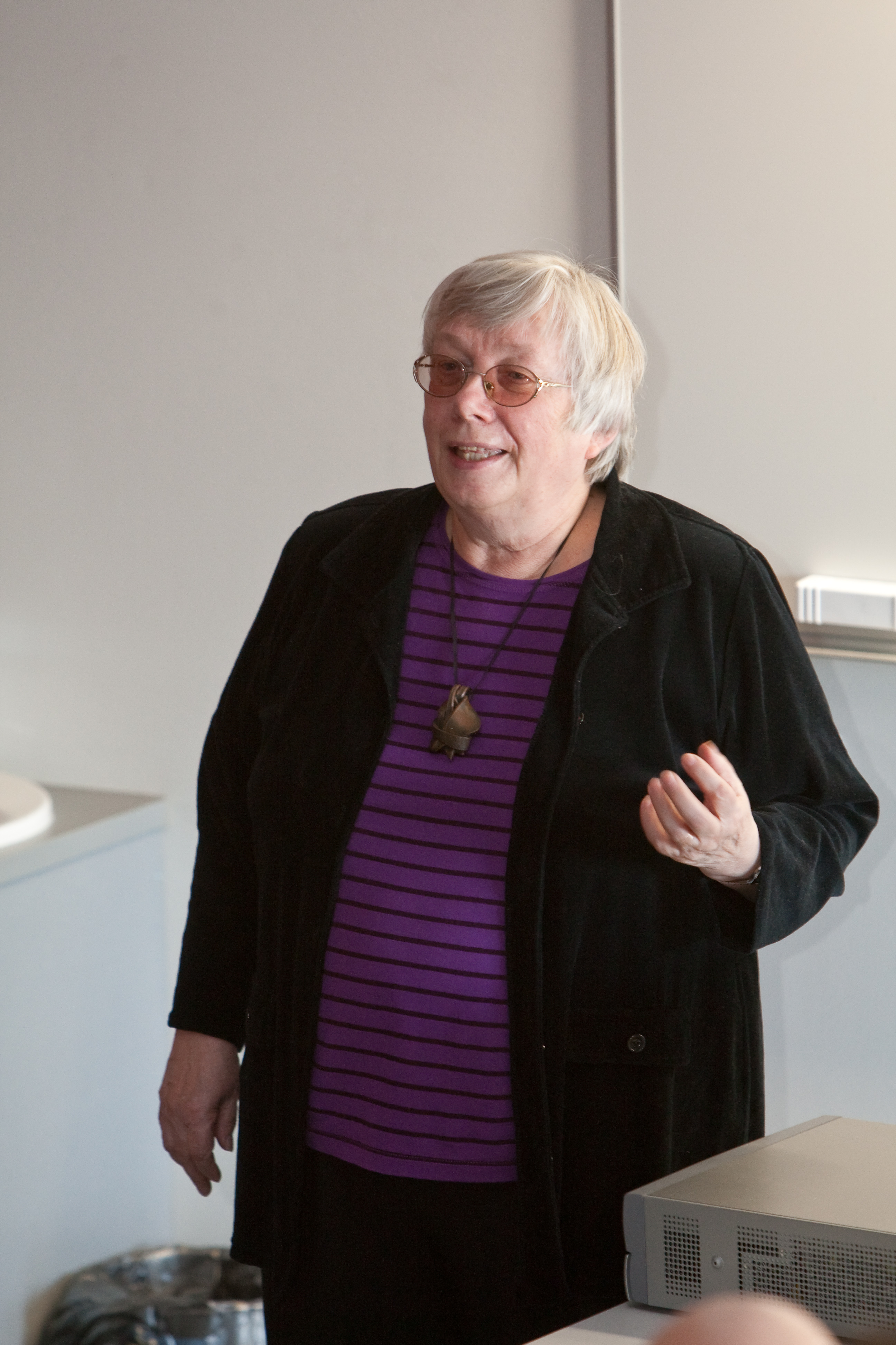 Professor Marju Lauristin 24. märtsil 2010 toimunud tänuüritusel Chemicumis, kus tunnustati 52 noort, kes esindasid Eestit 2009. aastal rahvusvahelistel koolinoorte teadusolümpiaadidel.